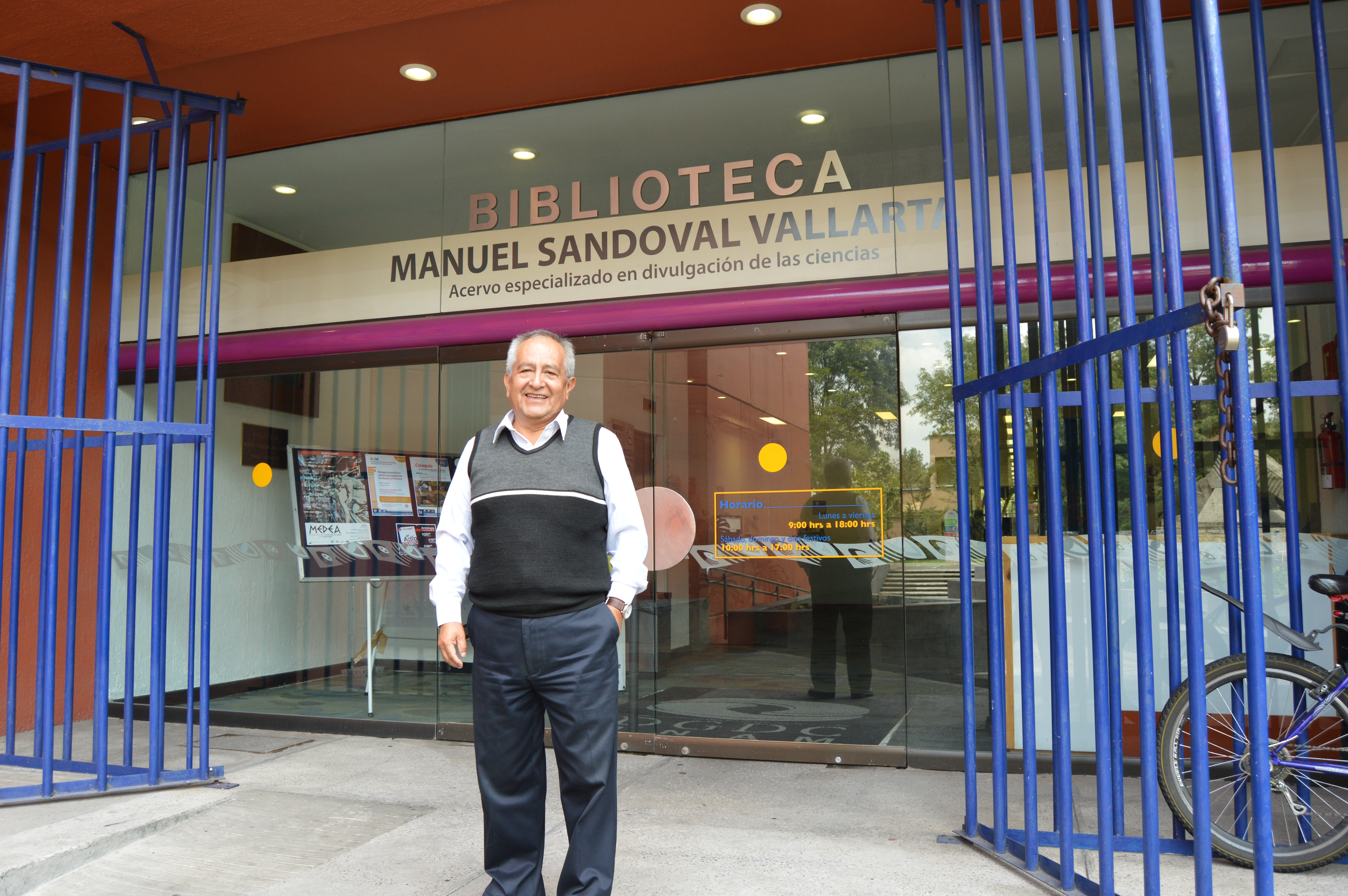 La entrada a la Biblioteca Manuel Sandoval Vallarta, con el director de la misma, el maestro Raúl Ortega Muñoz, en primer plano.